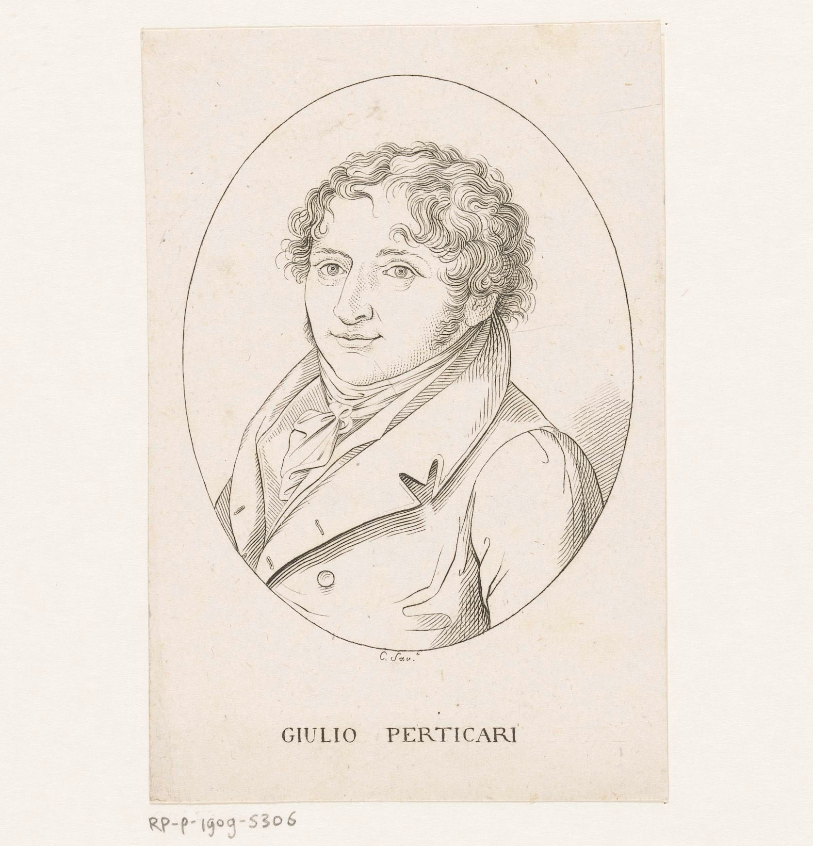 IdentificatieTitel(s): Portret van dichter en schrijver Giulio PerticariObjecttype: prent Objectnummer: RP-P-1909-5306Opschriften / Merken: verzamelaarsmerk, verso, gestempeld: Lugt 2228VervaardigingVervaardiger: prentmaker: C. Sav. (vermeld op object)Datering: 1800 - 1899Fysieke kenmerken: gravureMateriaal: papier Techniek: graveren (drukprocedé)Afmetingen: blad: h 128 mm (Binnen plaatrand afgesneden.) × b 85 mm (Binnen plaatrand afgesneden.)OnderwerpWat: historical personsportrait of a writerWie: Giulio PerticariVerwerving en rechtenVerwerving: aankoop 1905Copyright: Publiek domein